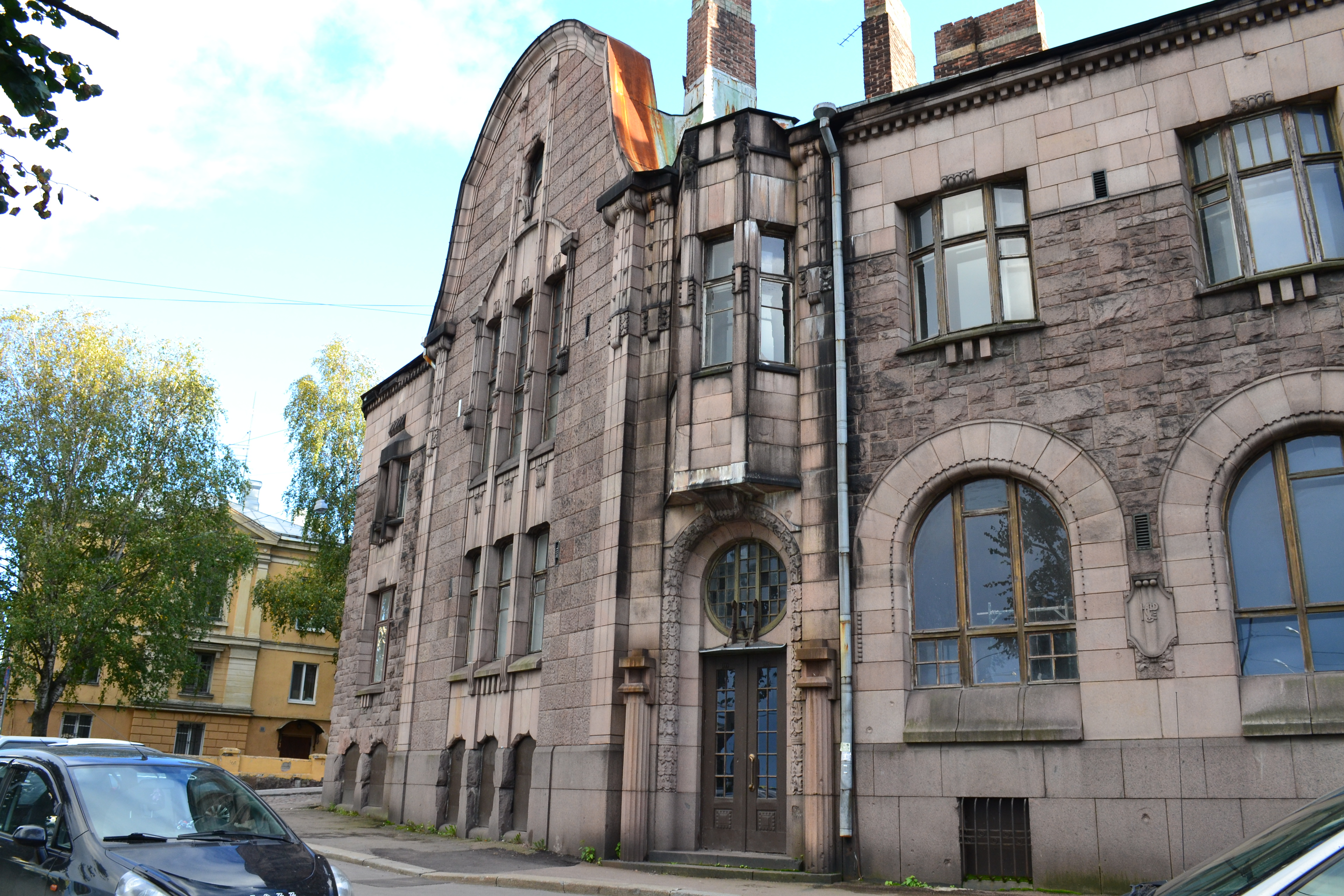 Здание фирмы хаакмен и к (Санкт-Петербург и Лен.область, Выборг, подгорная улица, 14, северный вал, 5)